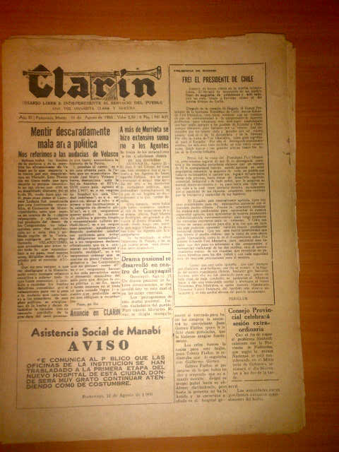 Editorial de El Clarin